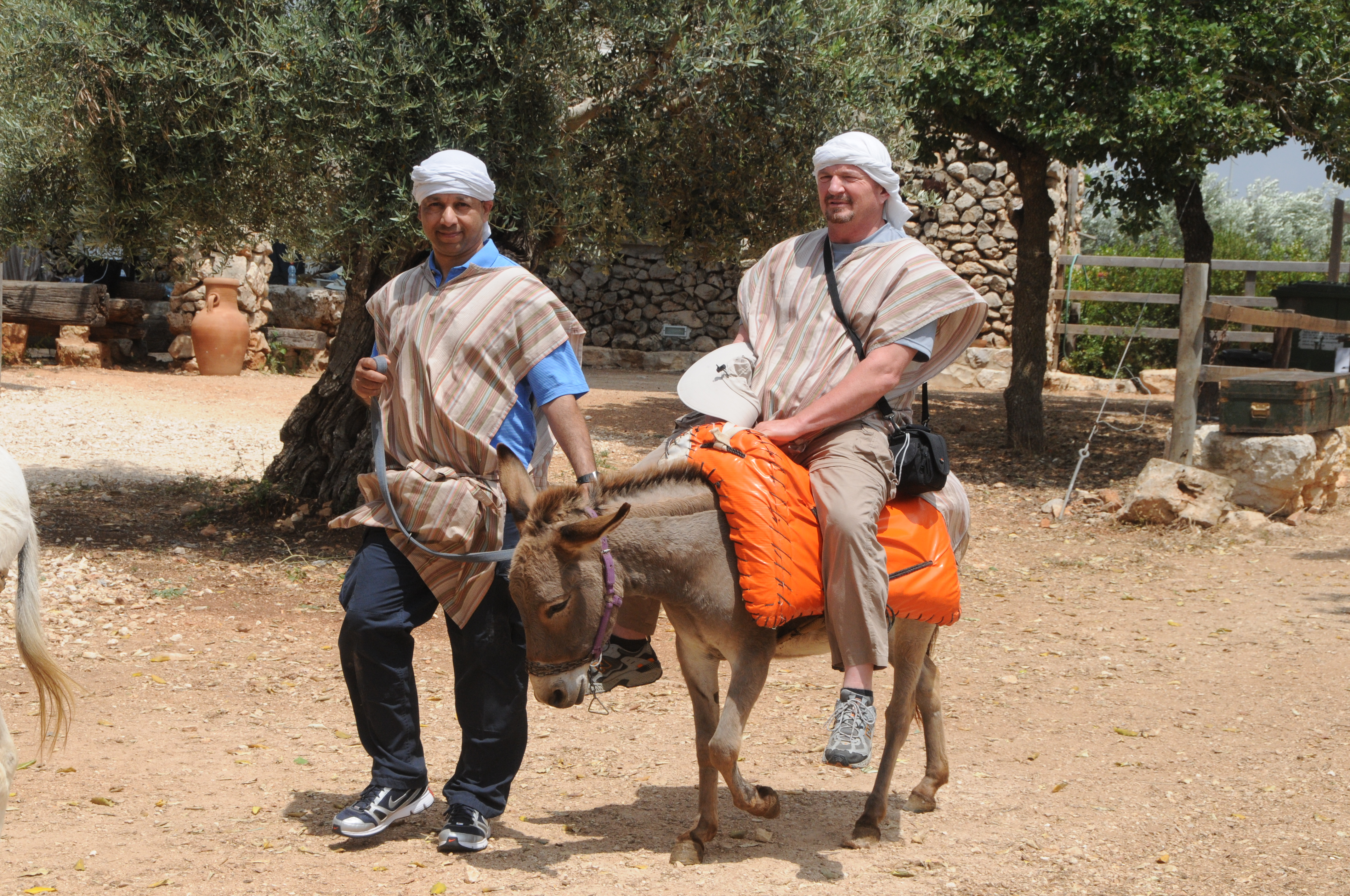 פעילות חמורים בכפר קדם